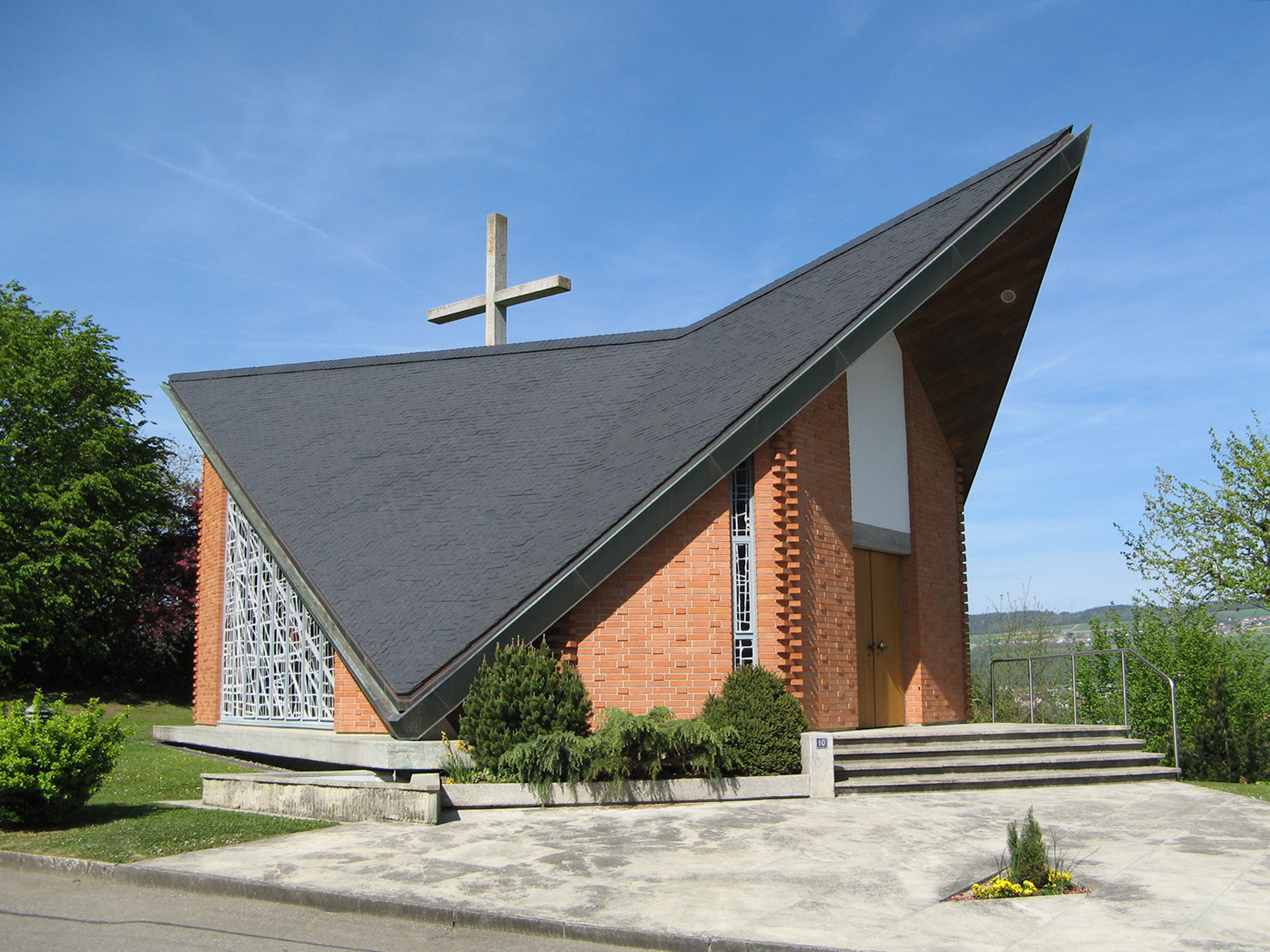 Heiligkreuzkapelle in Nesselnbach (Gemeinde Niederwil)